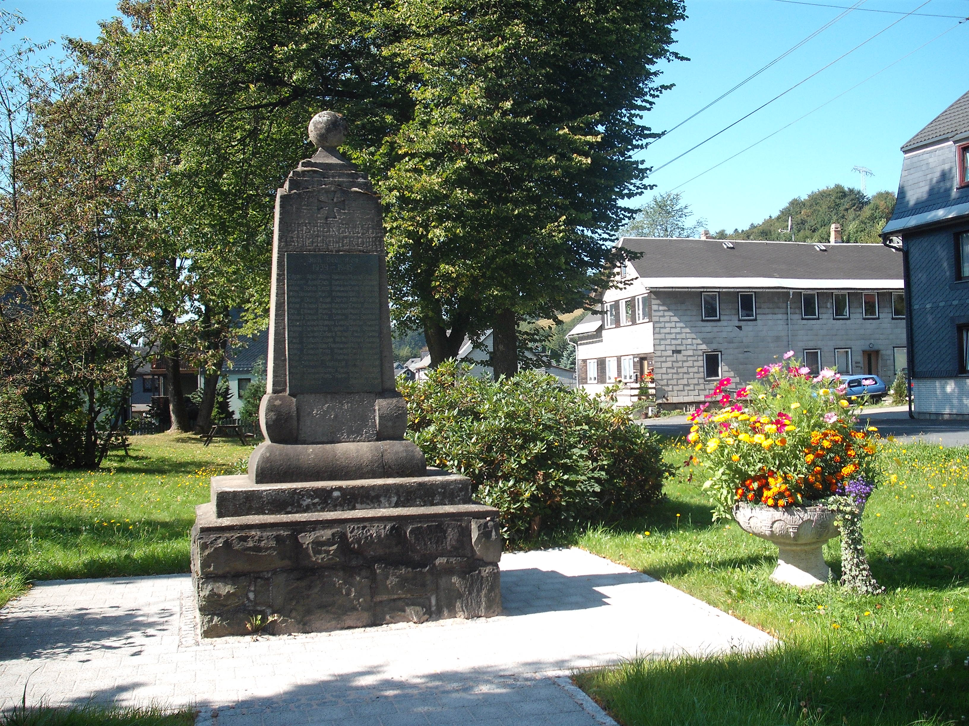 Eine kleine Grünfläche in Spechtsbrunn mit einem Ehrenmal für die Opfer zweier Weltkriege.